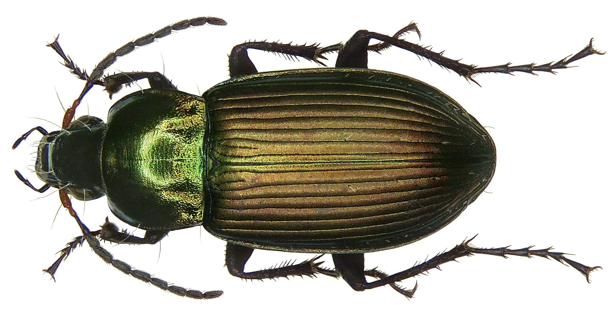 Familie: Carabidae Größe: 9-13 mm Verbreitung: Europa, Kleinasien bis Sibirien Fundort: Germania, Oberfranken, Bindlach leg.det. U.Schmidt, 1978 Foto: U.Schmidt, 2008